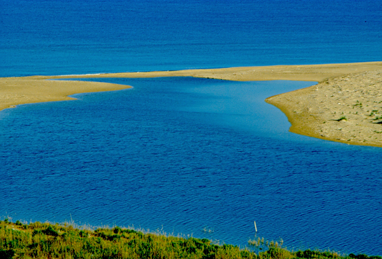 Riserva naturale Foce del Fiume Platani, Sicily